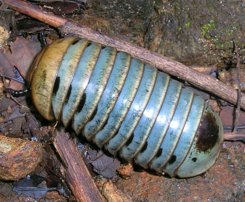 Pill millipede from Talakaveri, Coorg, India